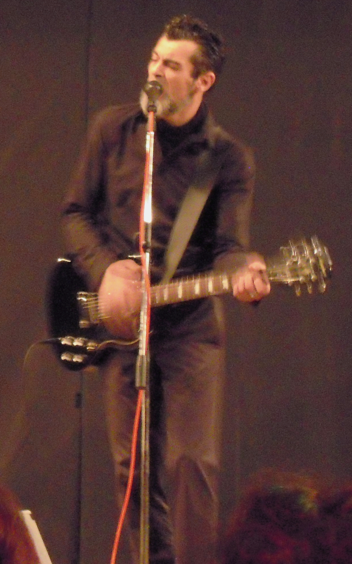 Xabier Deive na comedia Sede de mal en Mourente (Pontevedra)